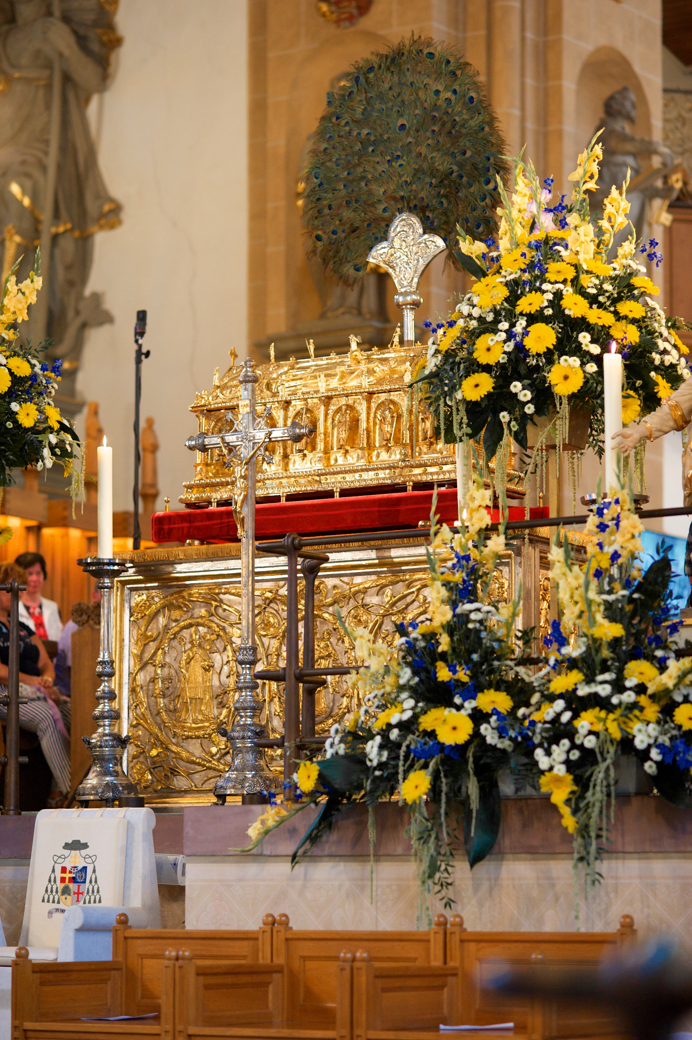 Liborischrein mit Pfauenwedel 2014